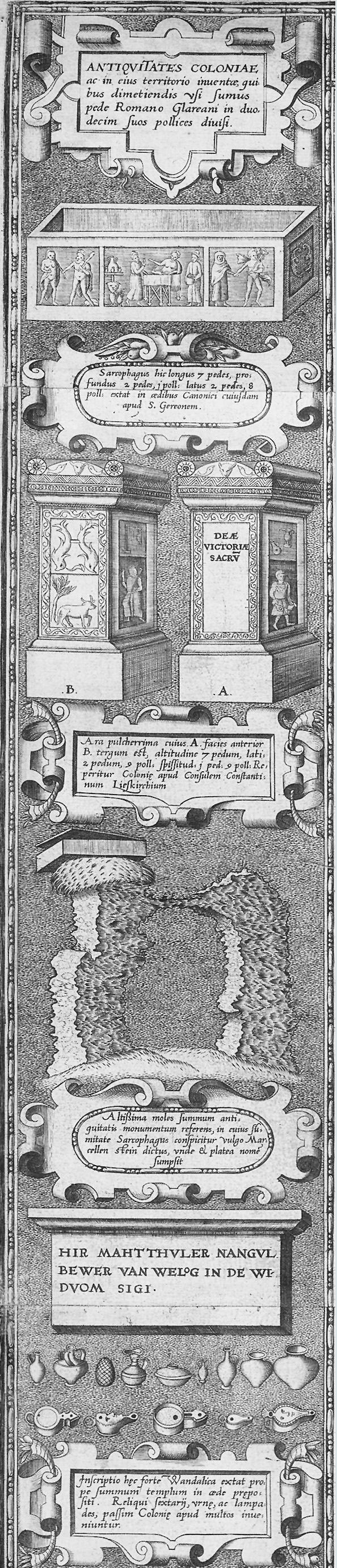 Ausschnitt des Mercator – Stadtplanes Köln. Detailzeichnungen, von Mercator als „antiquitates Coloniae“ bezeichnet, umranden den Kölner Stadtplan